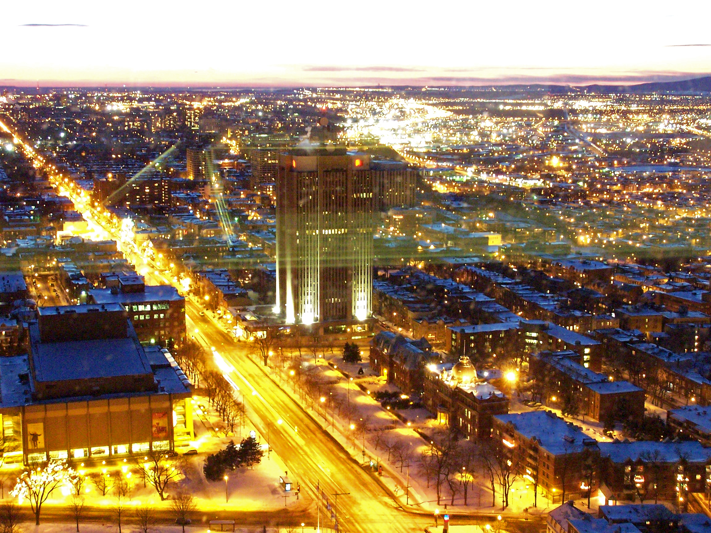 Vue à partir de l'observatoire de la Capitale. Vue vers l'ouest. Auteur:Stéphane Voyer